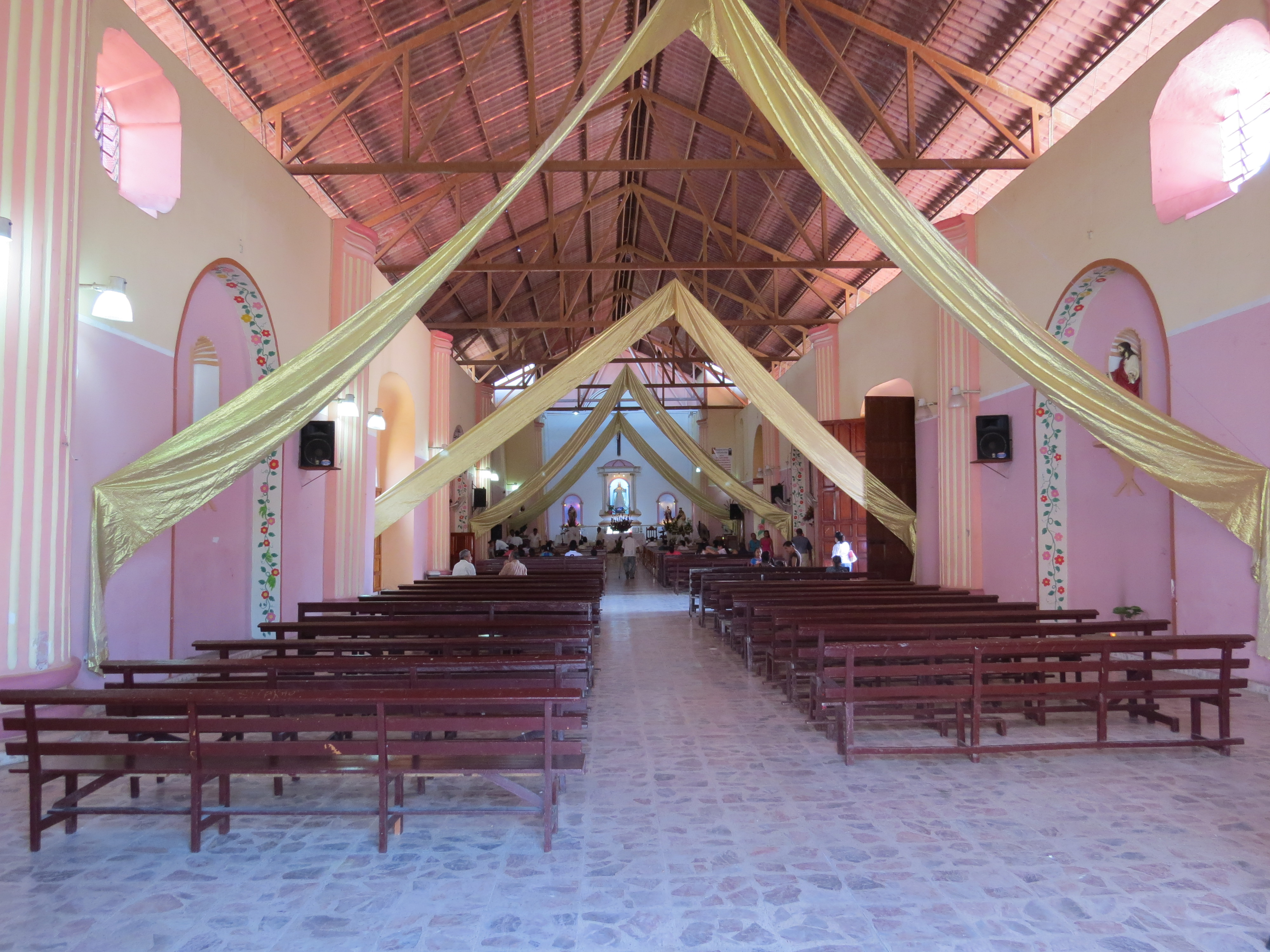 En la actualidad esta iglesia es la más antigua de Tabasco ya que su construcción inició en 1703 y culminó en 1710 cuando Tacotalpa era la capital de la provincia colonial de Tabasco. Sobrevivió a las fuertes crecientes del río de La Sierra que destruyeron gran parte de la ciudad colonial y a la campaña antirreligiosa emprendida por el entonces gobernador Tomás Garrido Canabal.